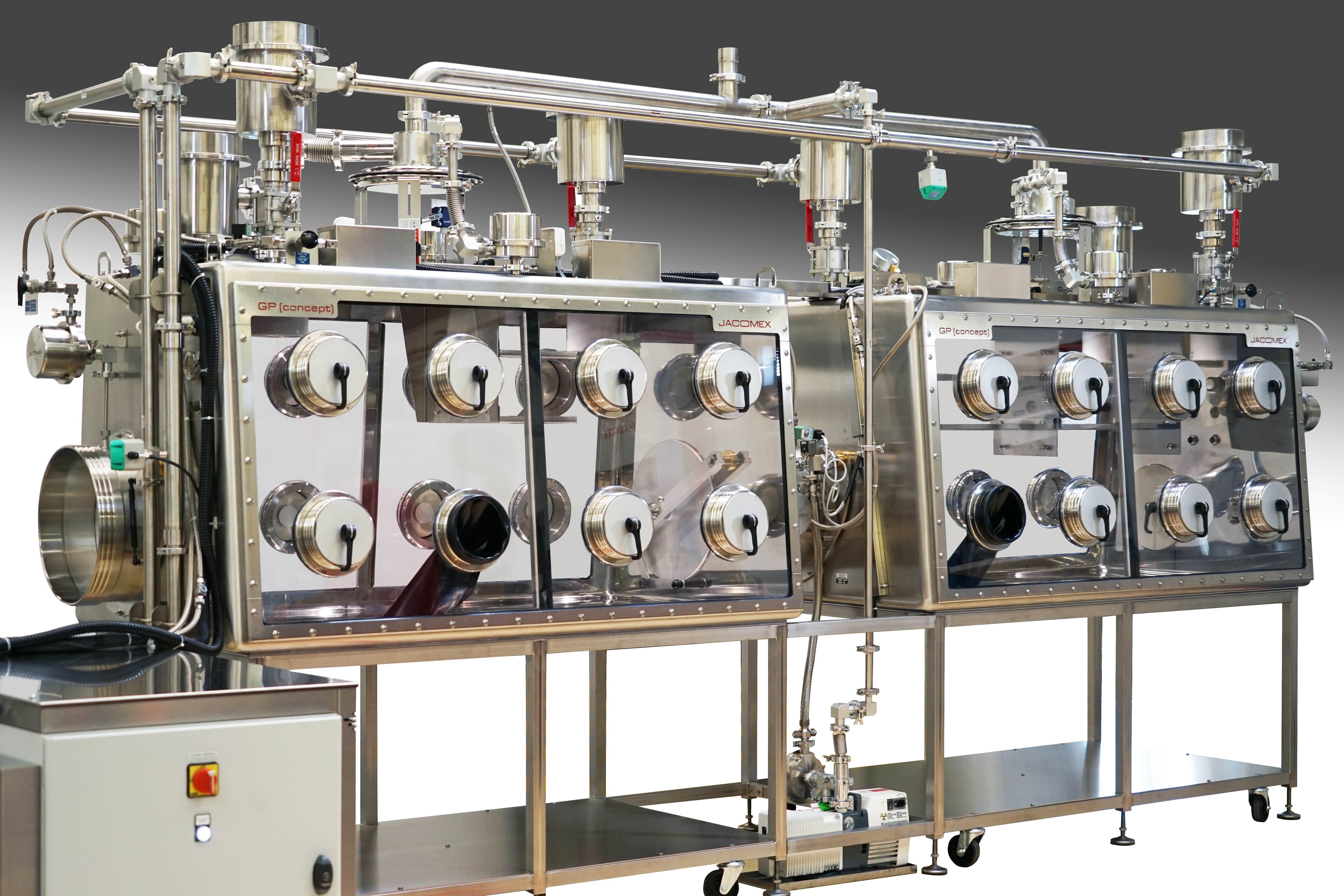 Photo boite à gants